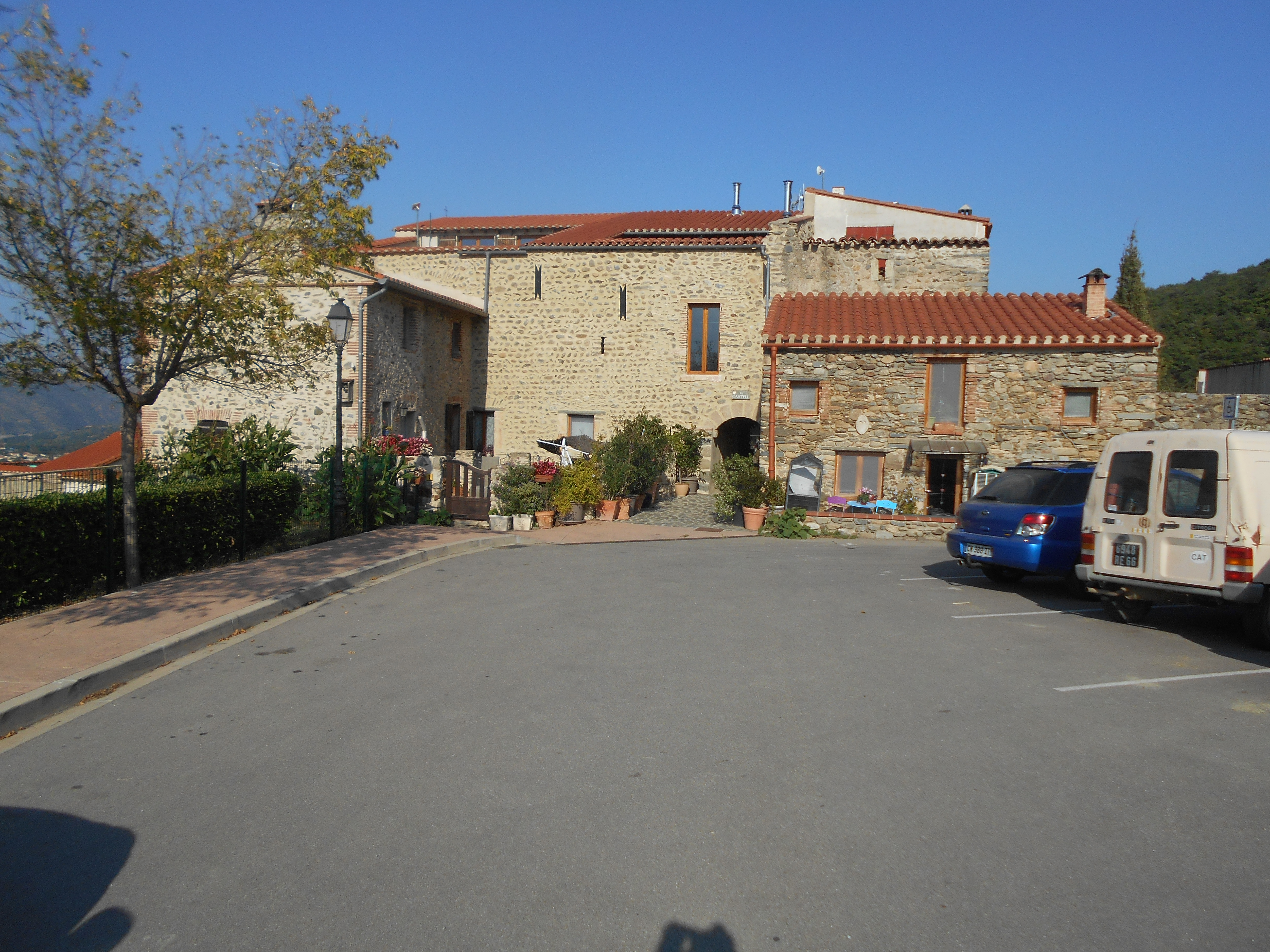 Porta oest del Castell de Jóc, al Conflent